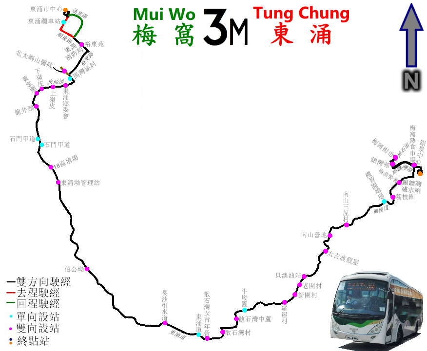 中文（香港）: 新大嶼山巴士3M線的走線圖